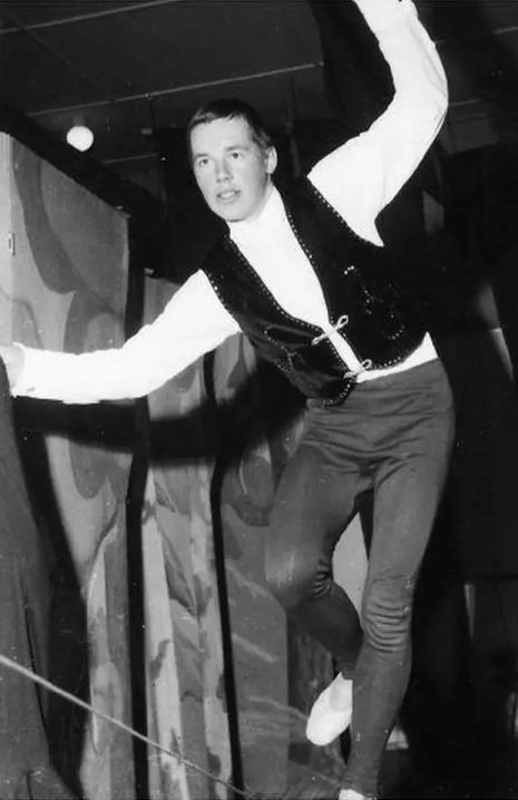 Aimo Leikas esiintyy Haukivuoren Kisapirtillä.